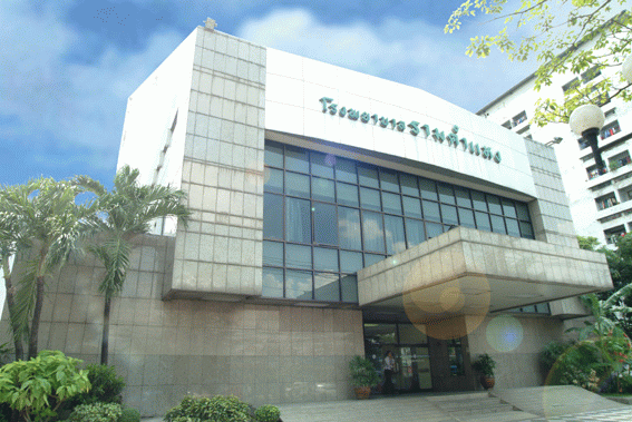 อาคาร 1 เริ่มให้บริการ พ.ศ.2531